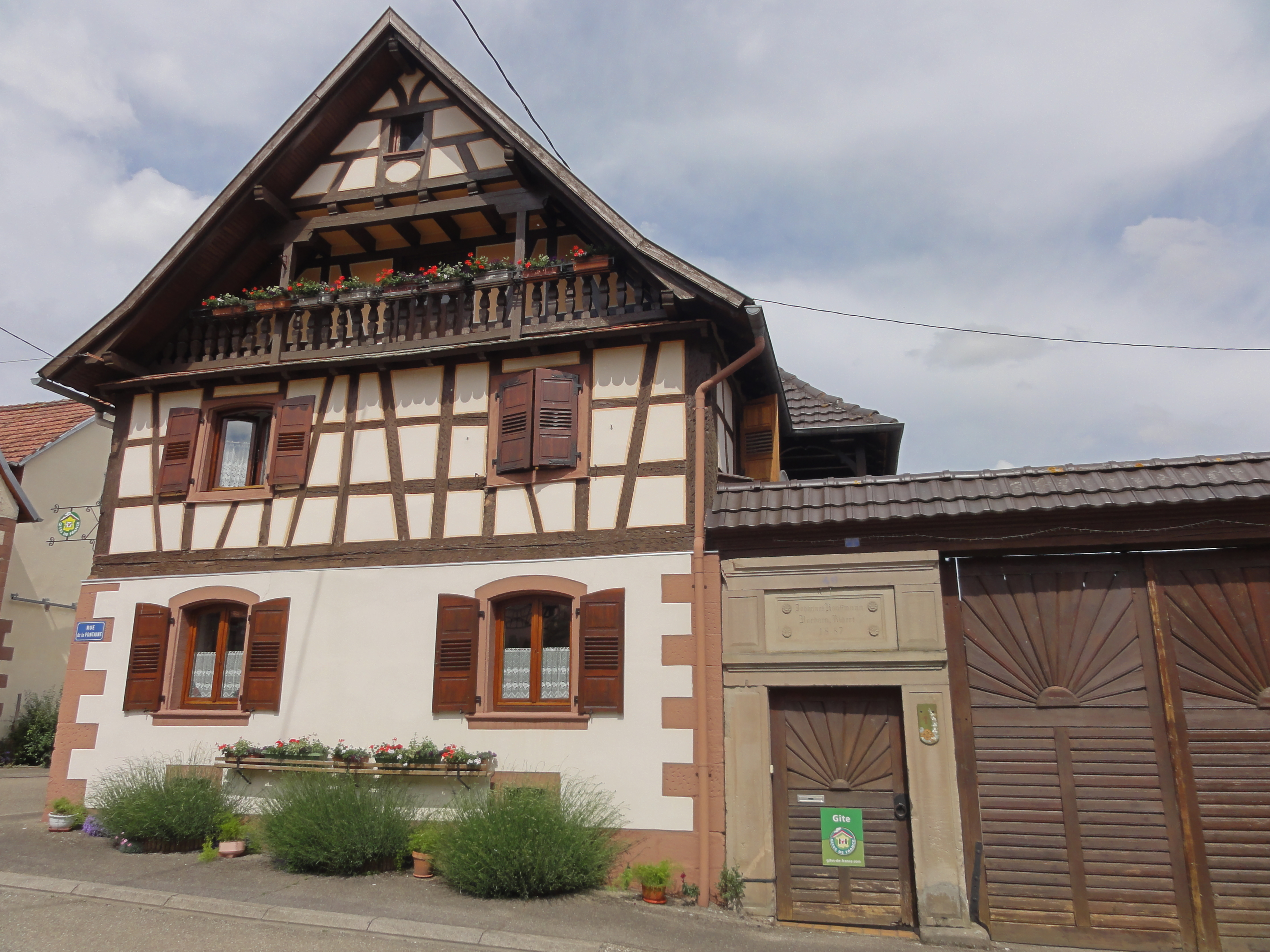 Alsace, Bas-Rhin, Gottesheim, Ferme (1887), 1 rue de la Fontaine.